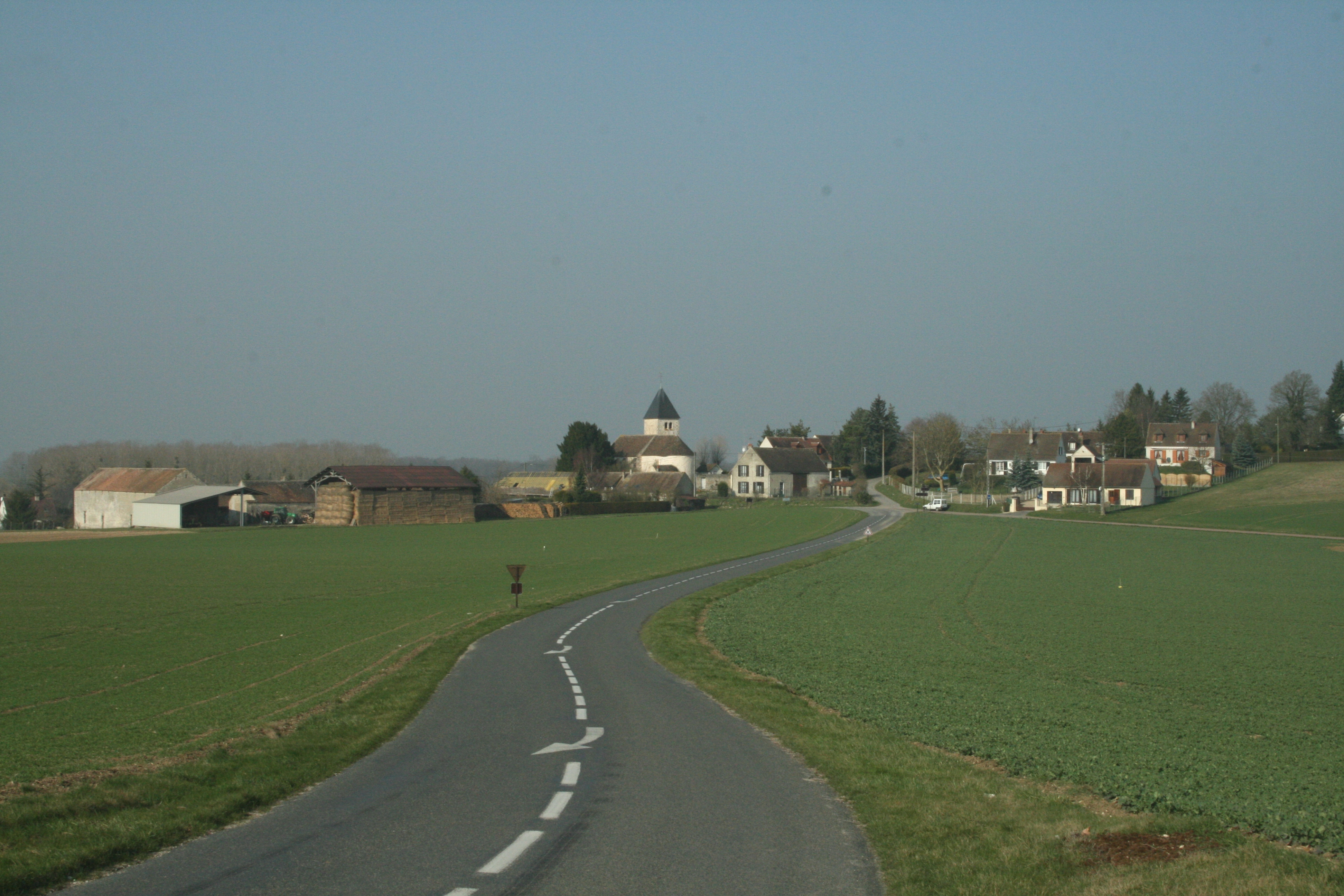 Une partie du village de Treuzy-Levelay. Celle où se situe l'église.